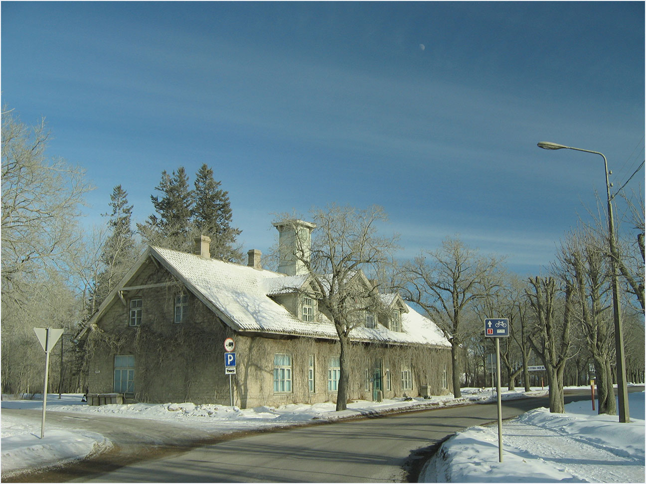 Kunda tsemendivabriku kontori hoone 2007